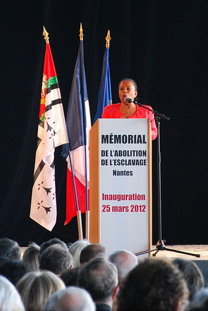 Christiane Taubira lors de l'inauguration du Mémorial de l'abolition de l'esclavage de Nantes, le 25 mars 2012.